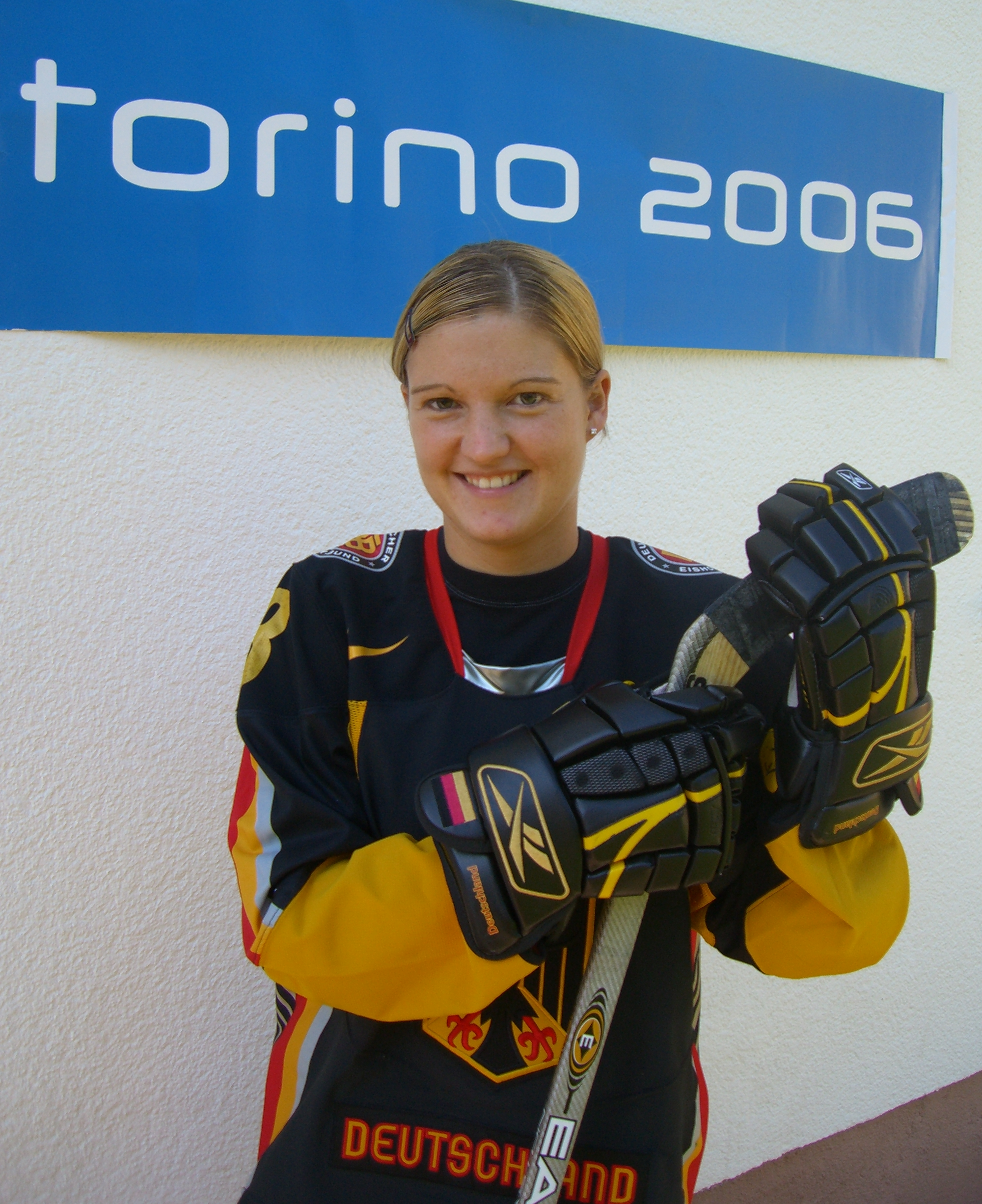 Sabrina Kruck, Olympia 2006